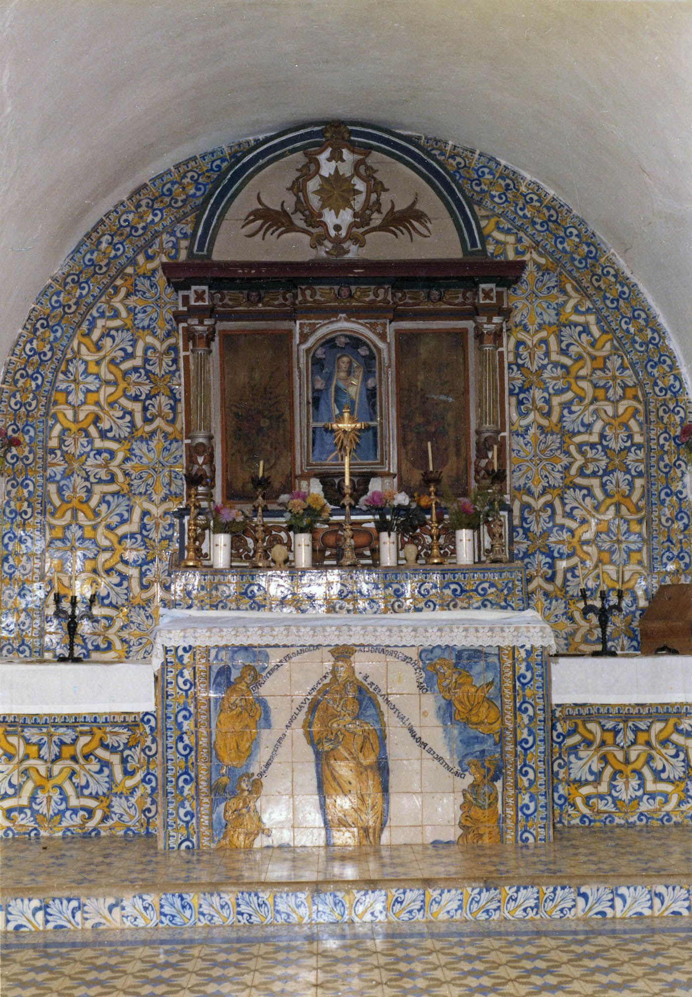 Altar-Mor. Fotógrafo: João Miguel dos Santos Simões, 1907-1972. Data de produção da fotografia original: 1960-1970. [CFT009.2186.ic]